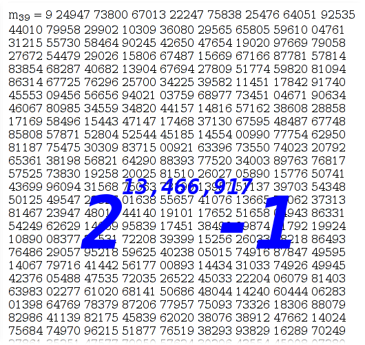 Una composición del mayor primo descubierto hasta la fecha para un artículo sobre primalidad